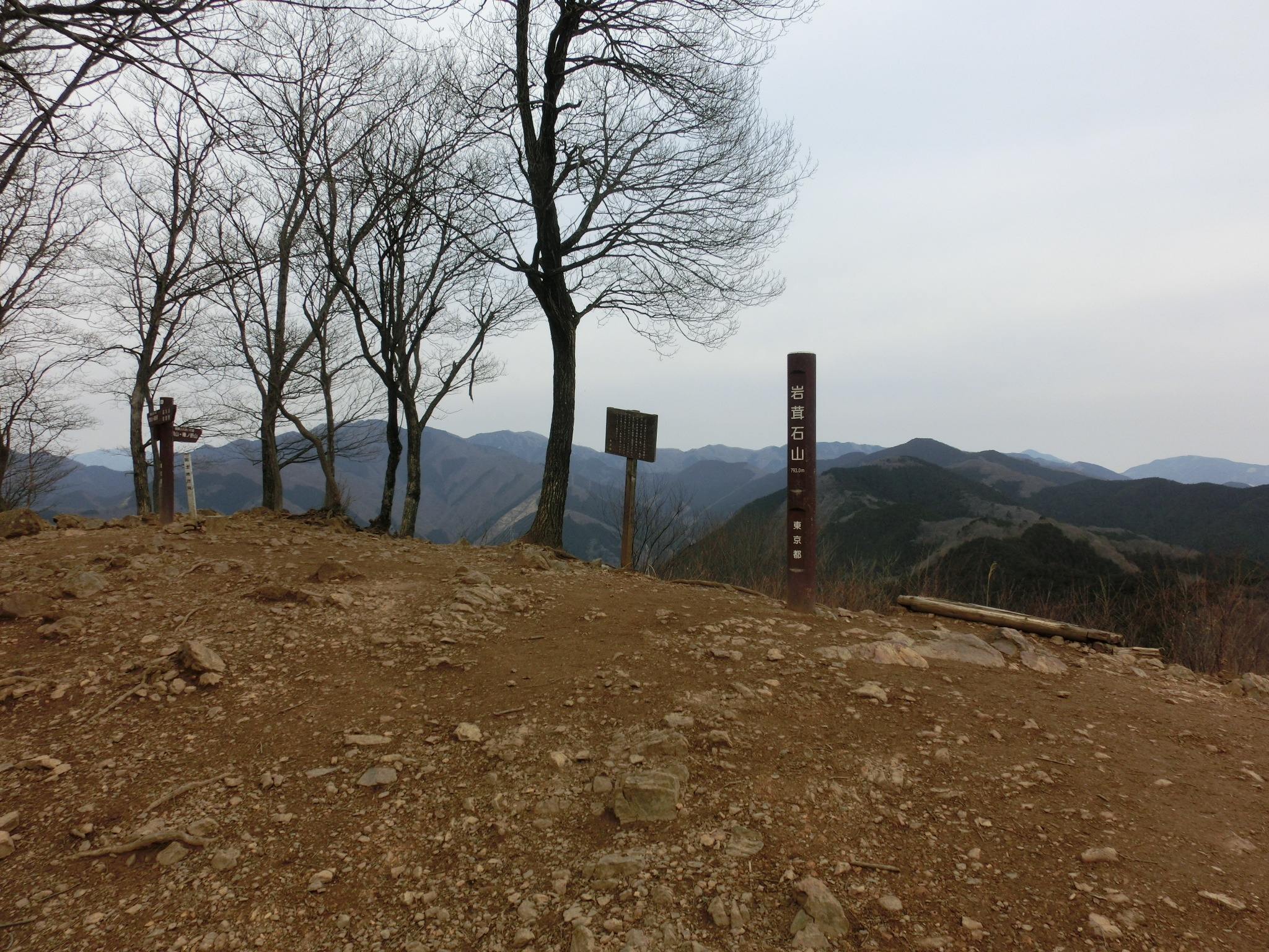 岩茸石山山頂